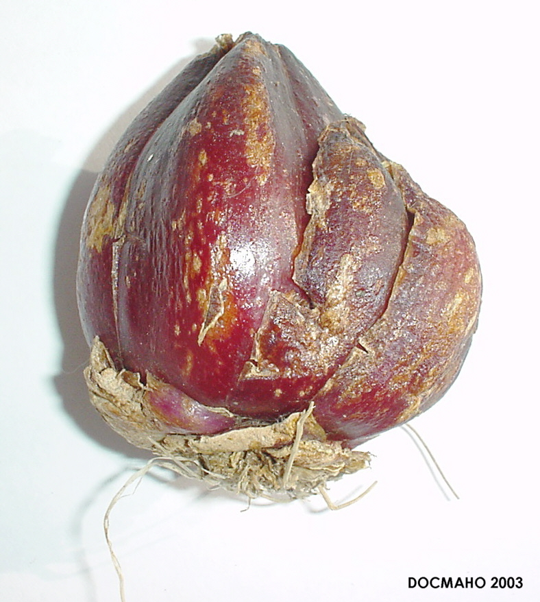 Lilium bakerianum bulb